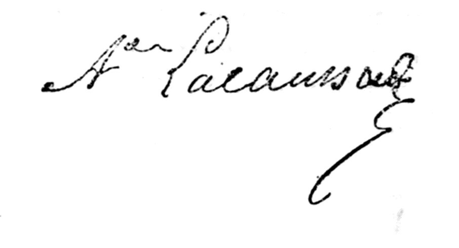 Signature Auguste Lacaussade